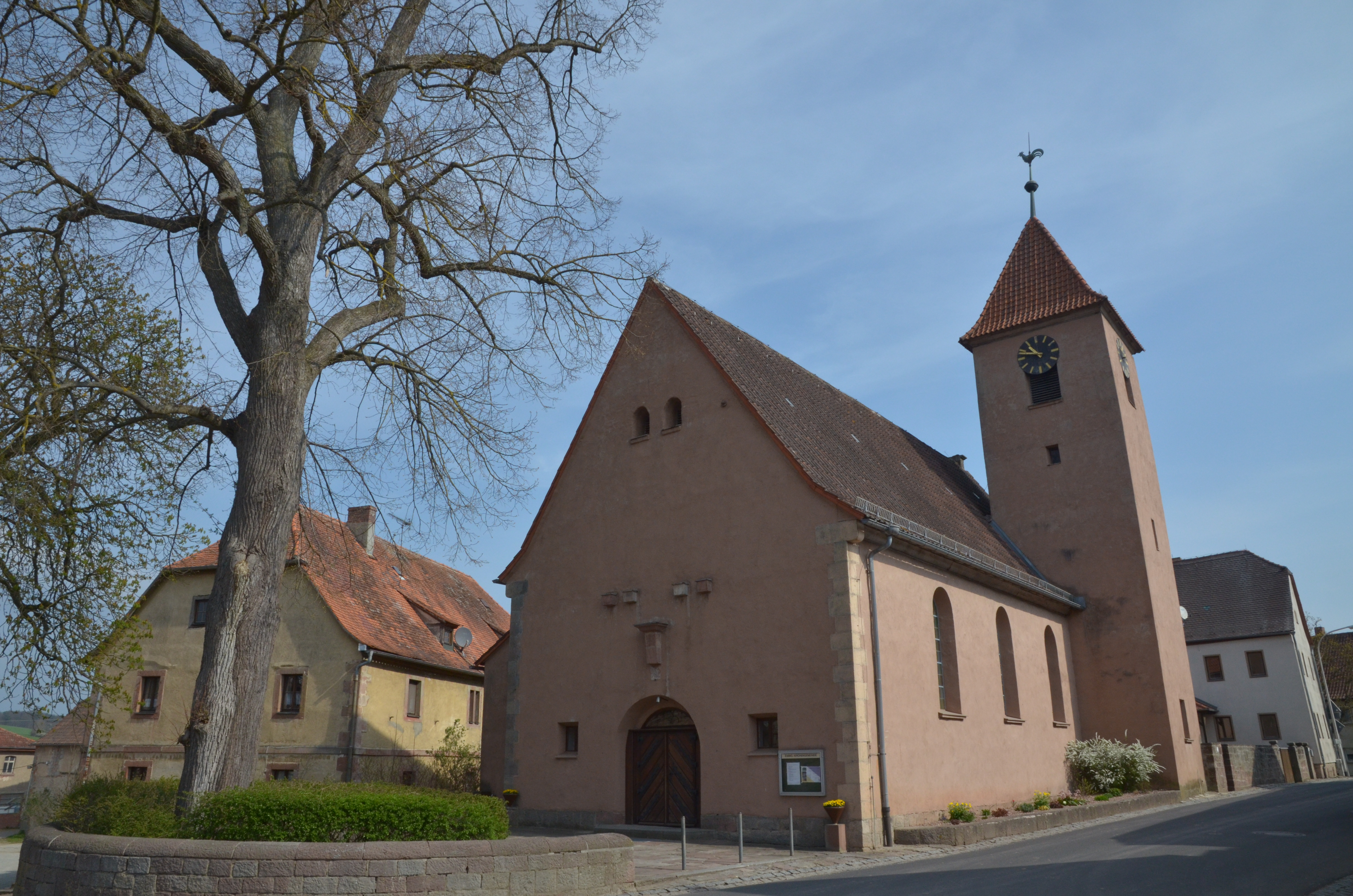 evang.-luth. Kirche in Waizenbach